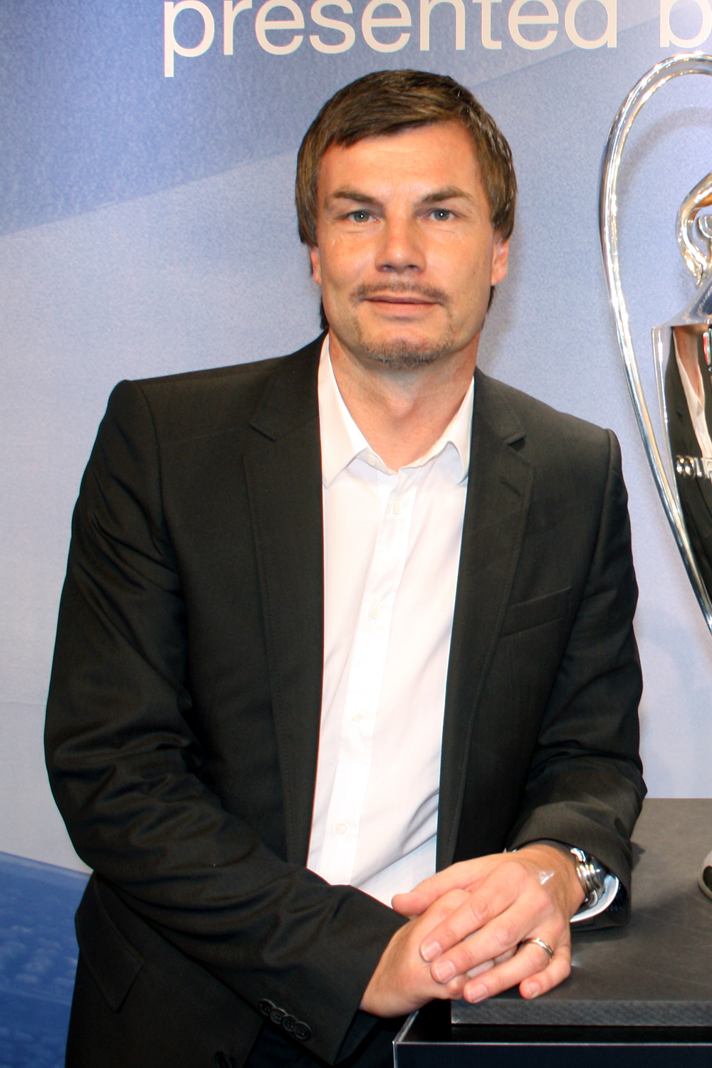 Tomas Helmer, ehemaliger deutscher Fußballspieler, derzeit Fernsehmoderator, am 19. September 2010 in München